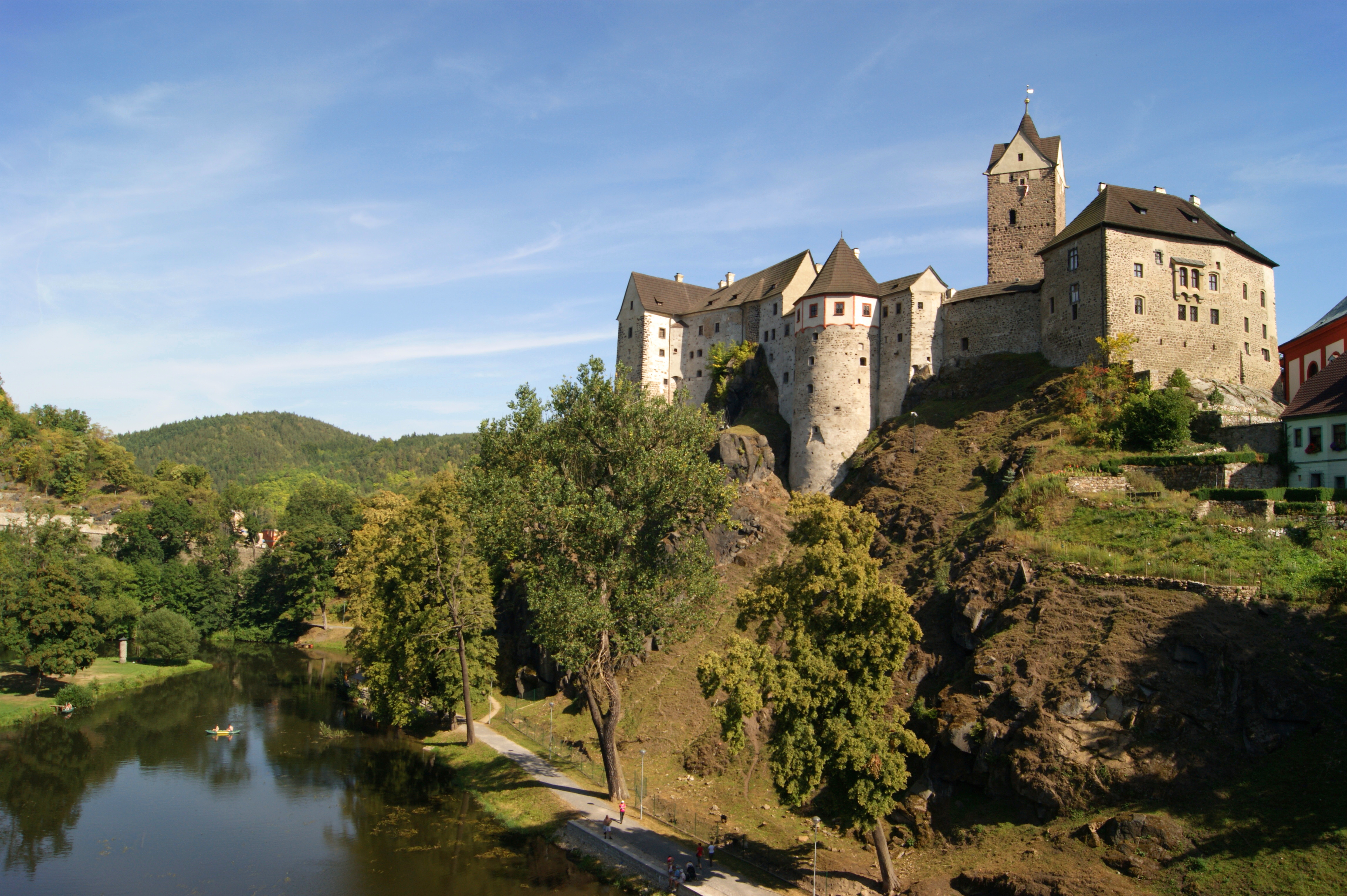 Hrad Loket (Loket), Zámecká 66, Loket, Loket (okres Sokolov) - pohled z mostu přes řeku Ohři